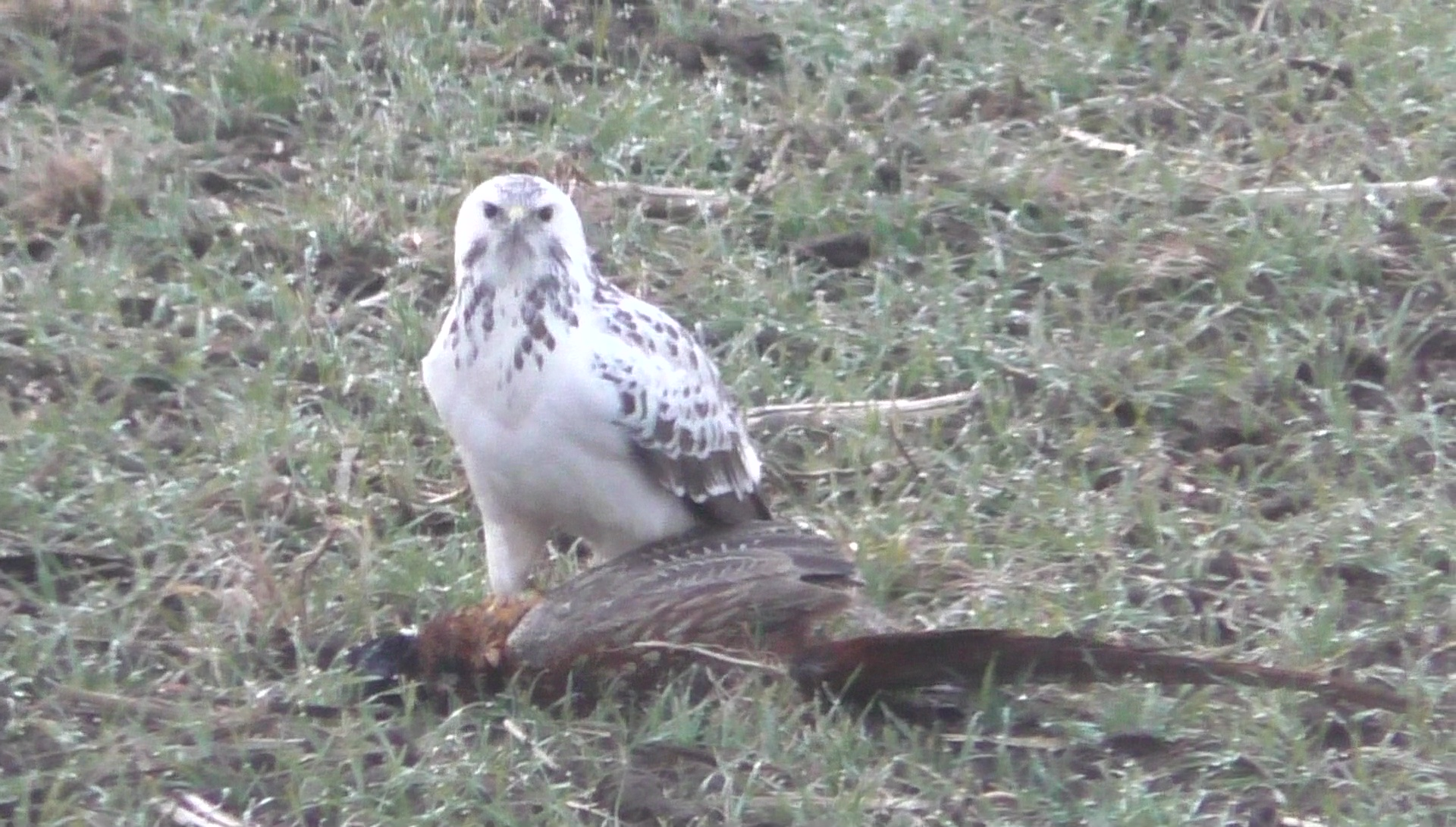 Ein Greifvogel hat einen Fasan erbeutet.